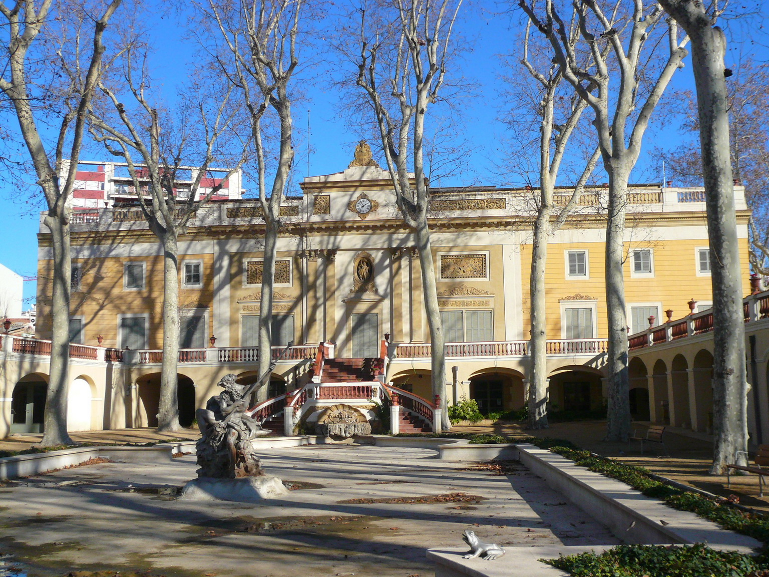 Palau Falguera, a Sant Feliu de Llobregat, Catalunya.